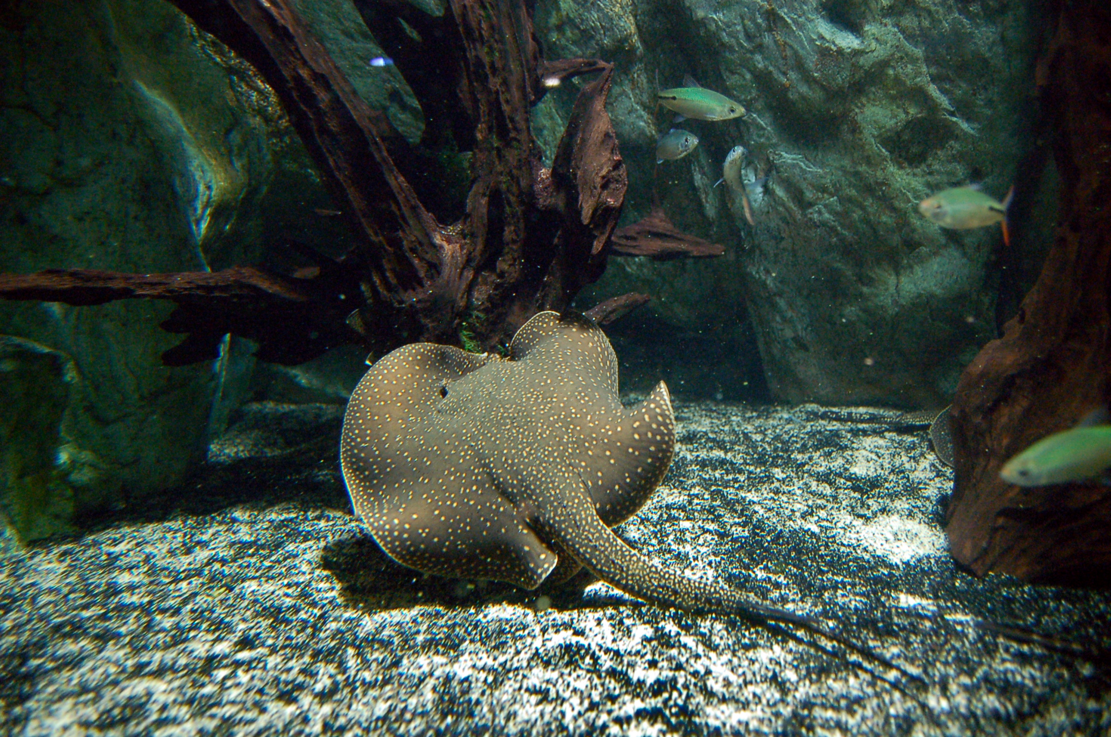 Raie d'eau douche tachetée - Potamotrygon castexi Aquarium tropical du Palais de la Porte Dorée. Paris. France.